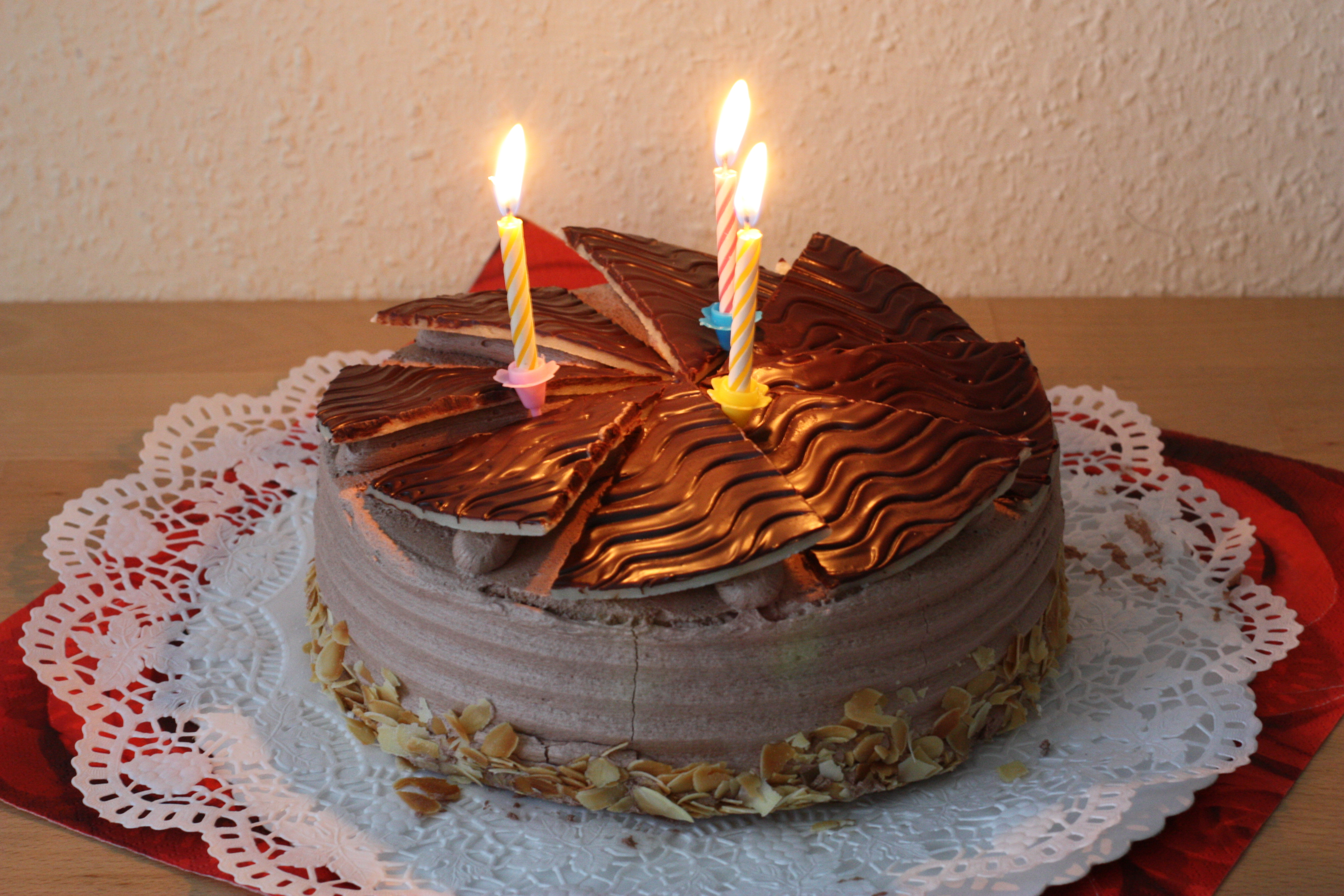 Schokoladentorte, Buttercreme, Tulpen ,dritter Geburtstag, drei Kerzen